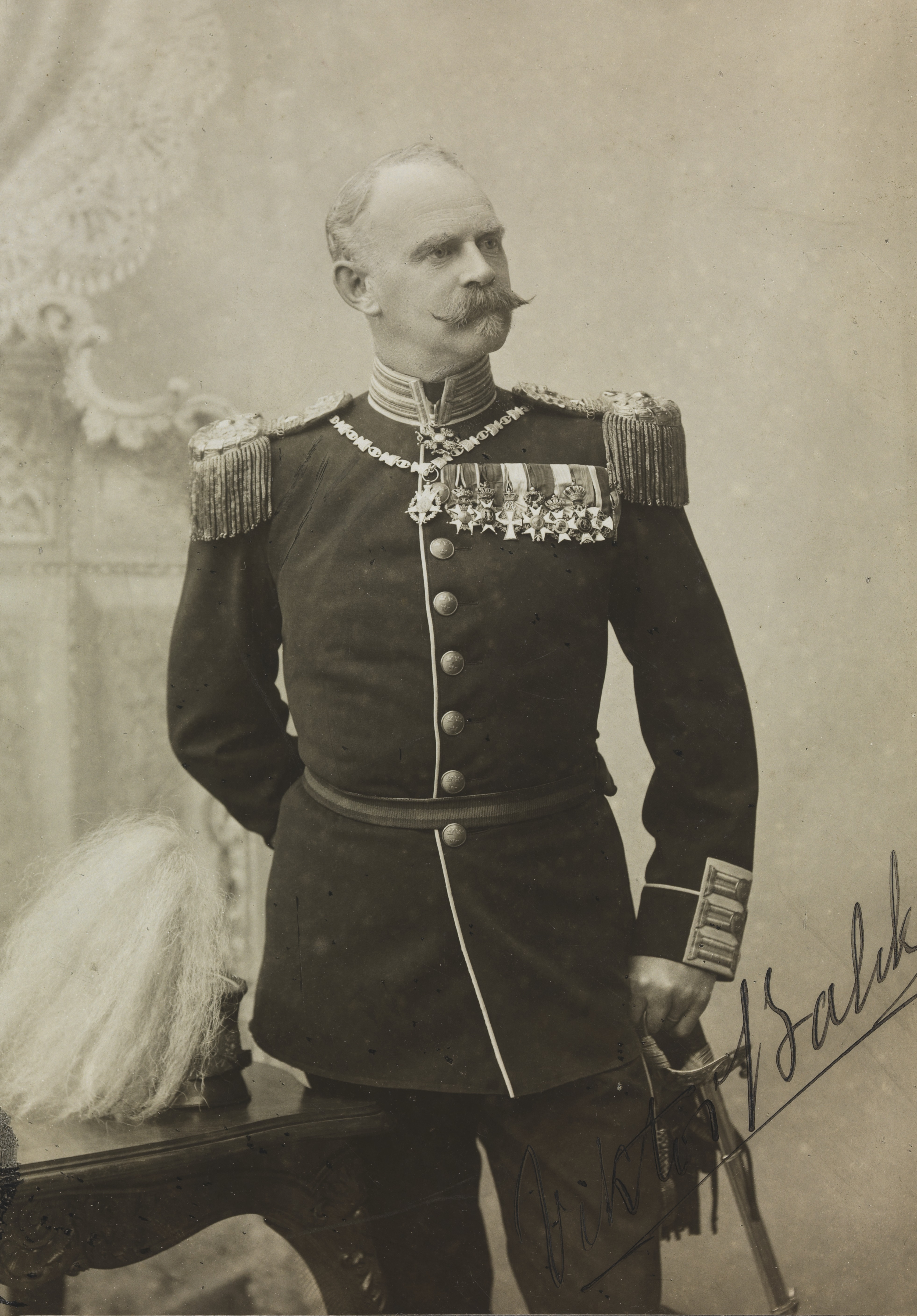 Viktor (Gustav) Balck, svensk offiser og idrettslærer, fra 1914 generalmajor. Særlig arbeidet han for å fremme ungdoms fysiske fostring. Betegnes som den svenske idrettens far. Depicted person: Balck, Viktor (Gustav) (1844-1928) Depicted place: Sverige, Stockholm